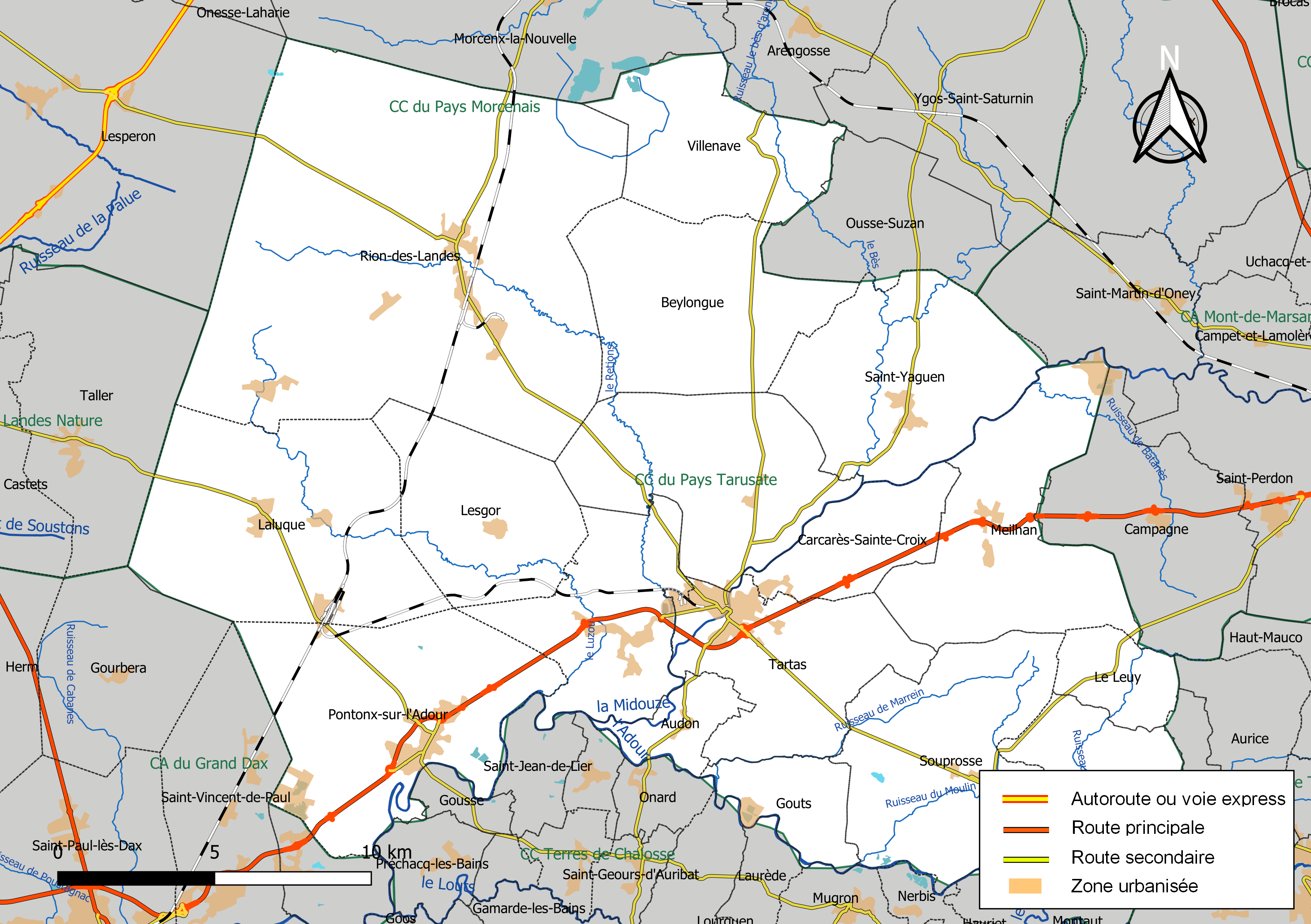 Carte géographique de la Communauté de communes du Pays Tarusate, département des Landes, France. Composition au 1er janvier 2019.